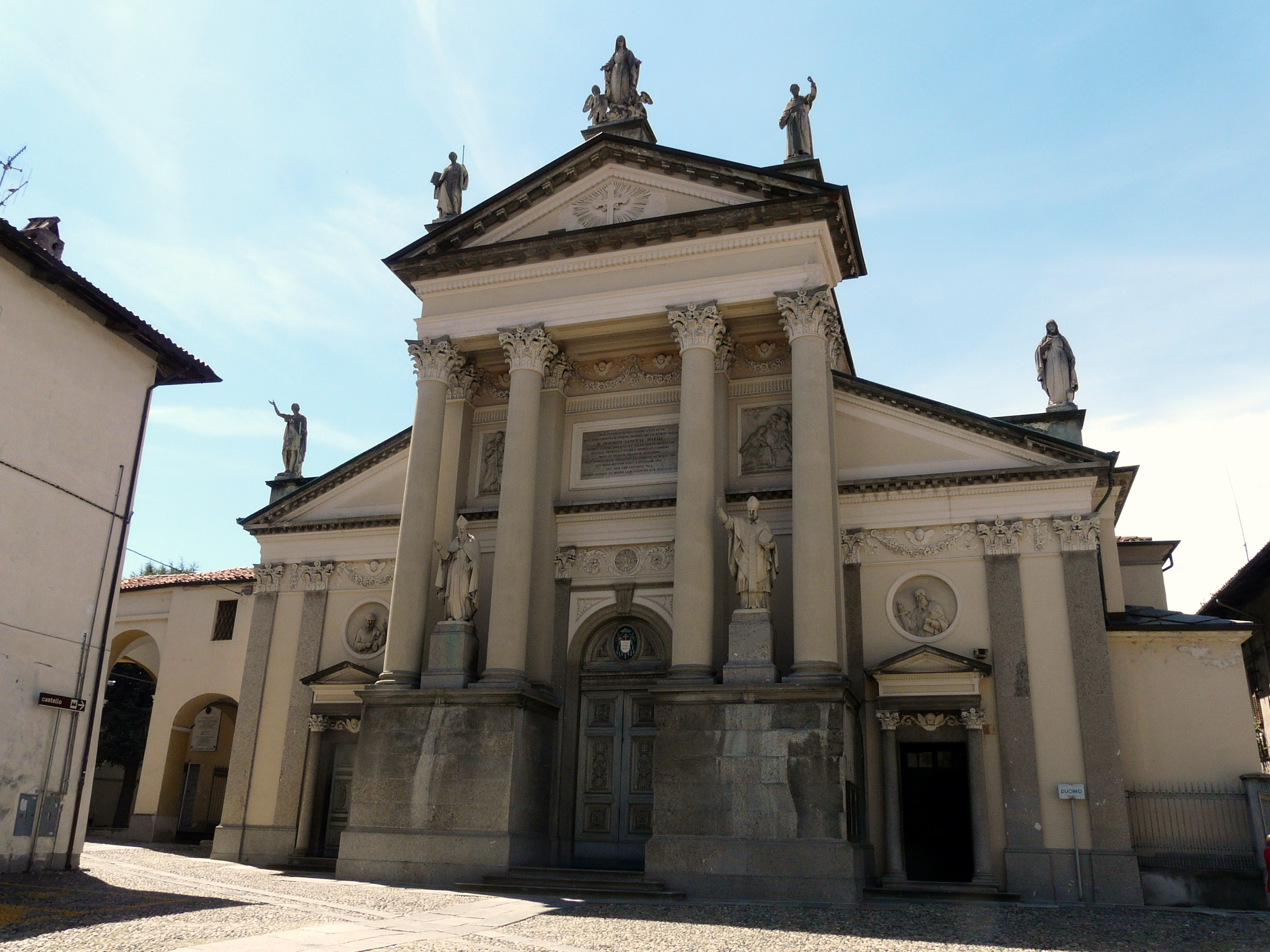 Duomo di Ivrea, Piemonte, Italia